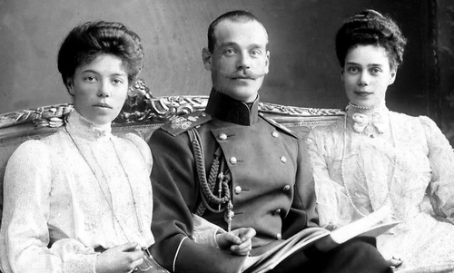 ロシア皇帝アレクサンドル3世の子供達。オリガ、ミハイル、クセニア